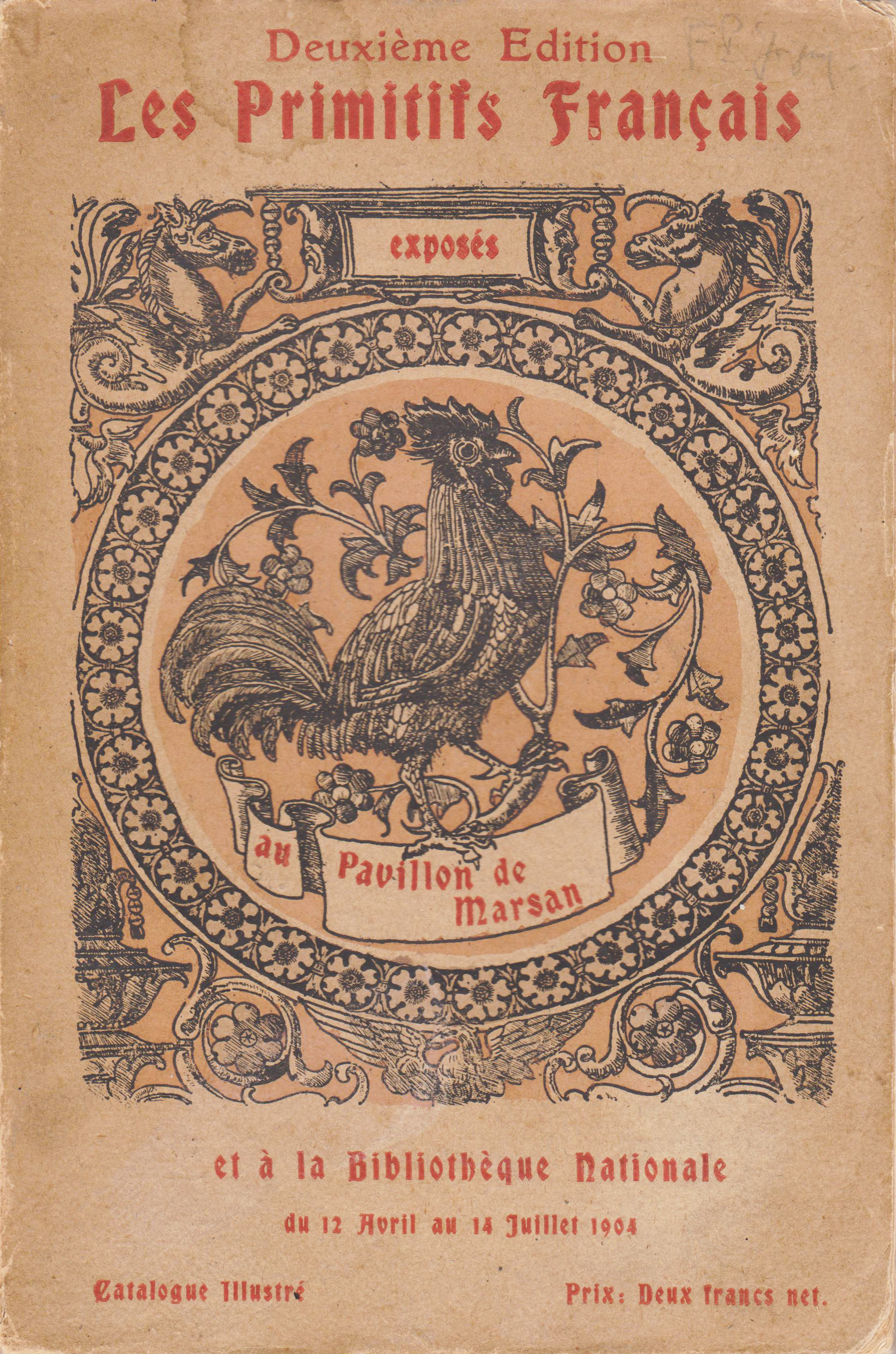 Couverture de l'exposition de 1904 "Les Primitifs français" (dir. Henri Bouchot)